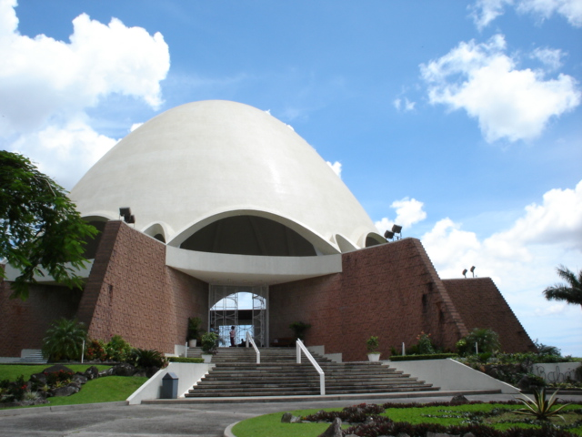 Casa de Adoración BAHA'I, en la Ciudad de Panamá, República de Panamá. Diseñada por el arquitecto londinense Peter Tillotson. Abierta al público el 29 de abril de 1972. Autor: Jorge Cedeño, Panamá